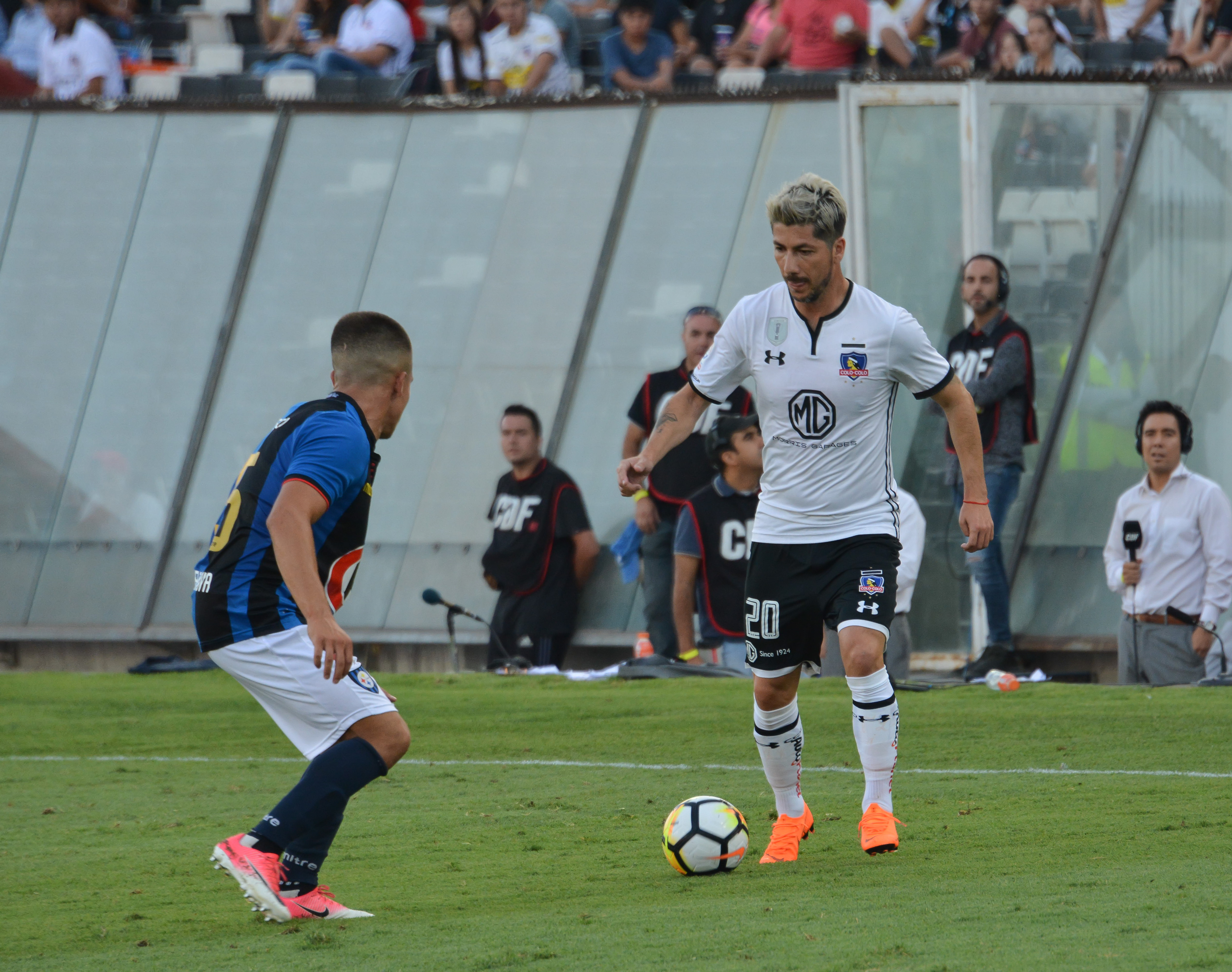 Colo Colo v Huachipato, Estadio Monumental, Santiago, Chile.